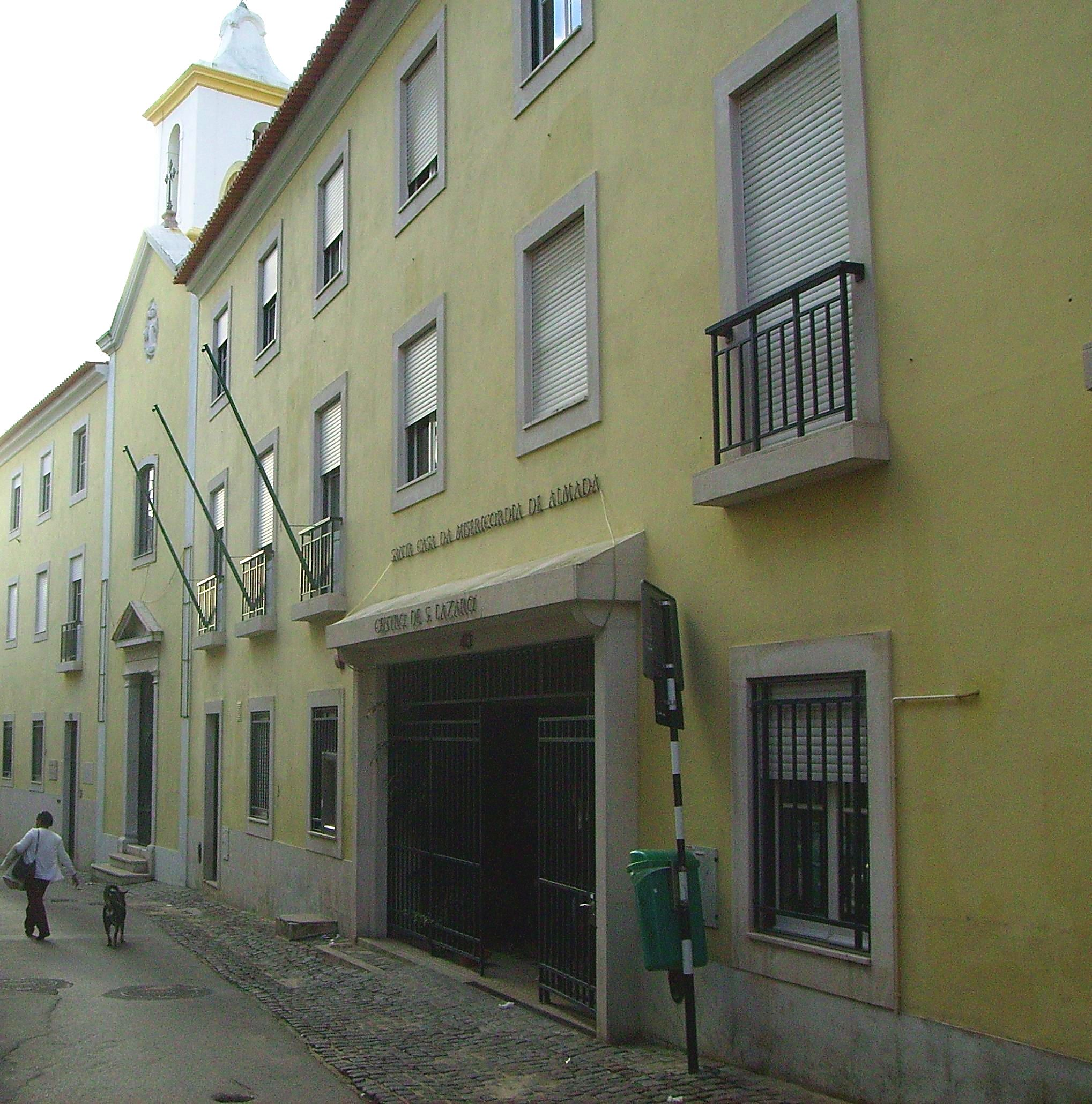 Autore: Massimo De Maria Descrizione: Santa Casa da Miseriscordia Licenza: CC 2.0